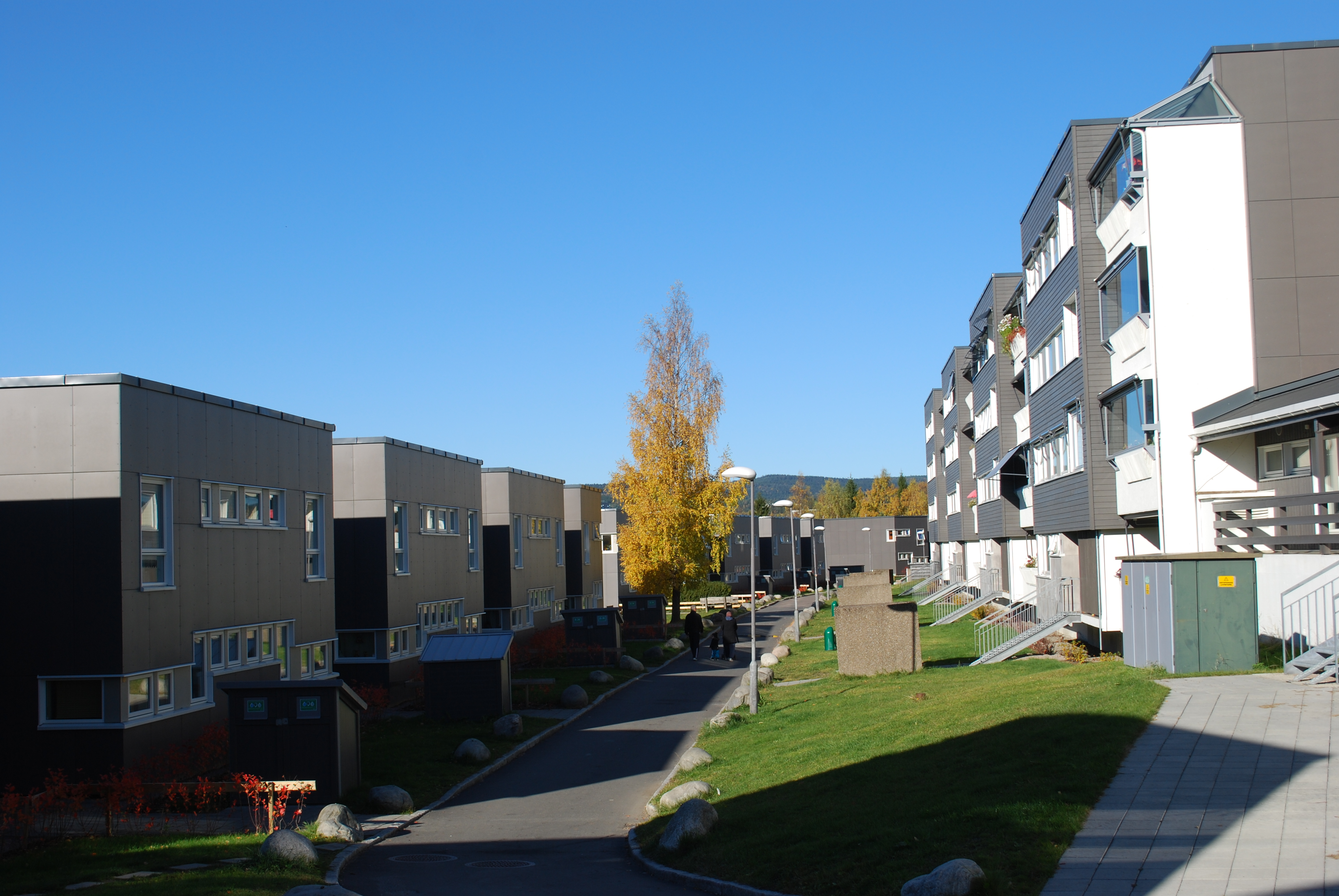 Blokker fra slutten av 1970-årene og gangvei i Slåttevangen borettslag, Høybråtenveien 3 (til høyre) og 5 og 7 (til venstre). Området Haugen i drabantbyen Furuset.